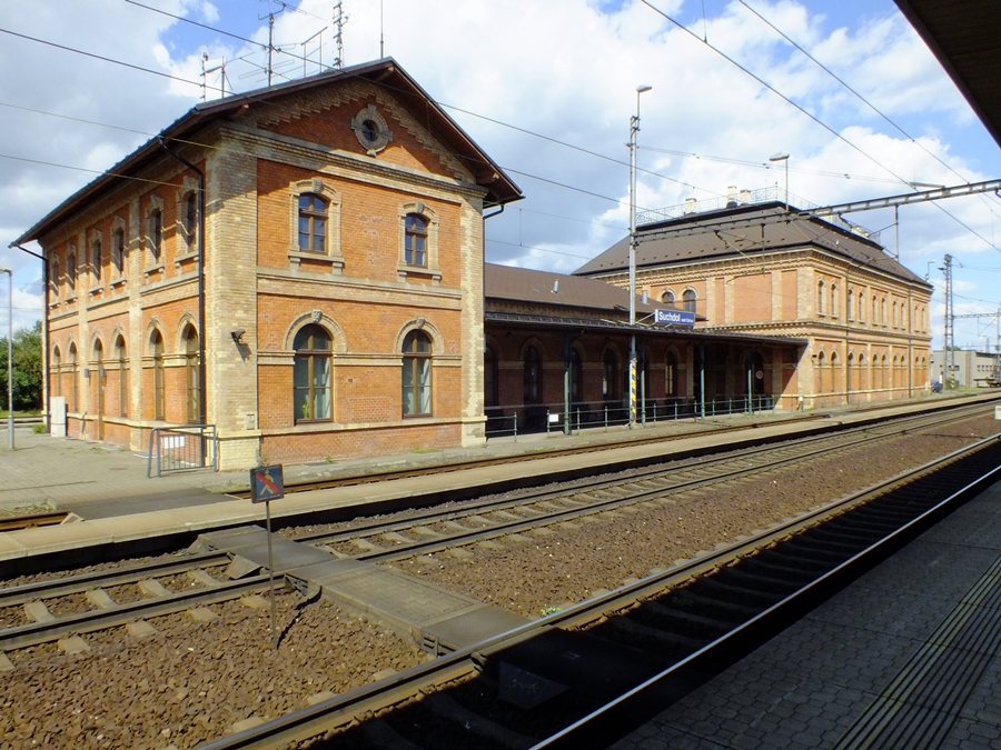 Staniční budova